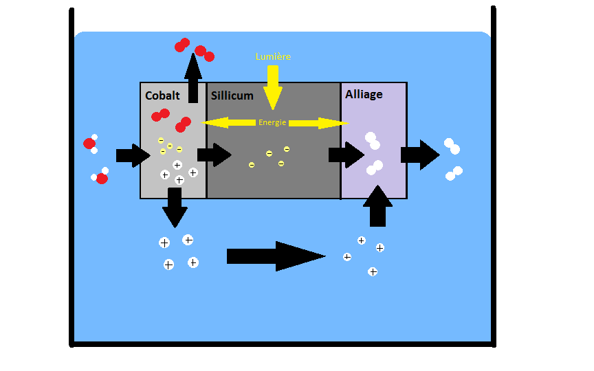 Schéma résumant la réaction de photosynthèse artificielle